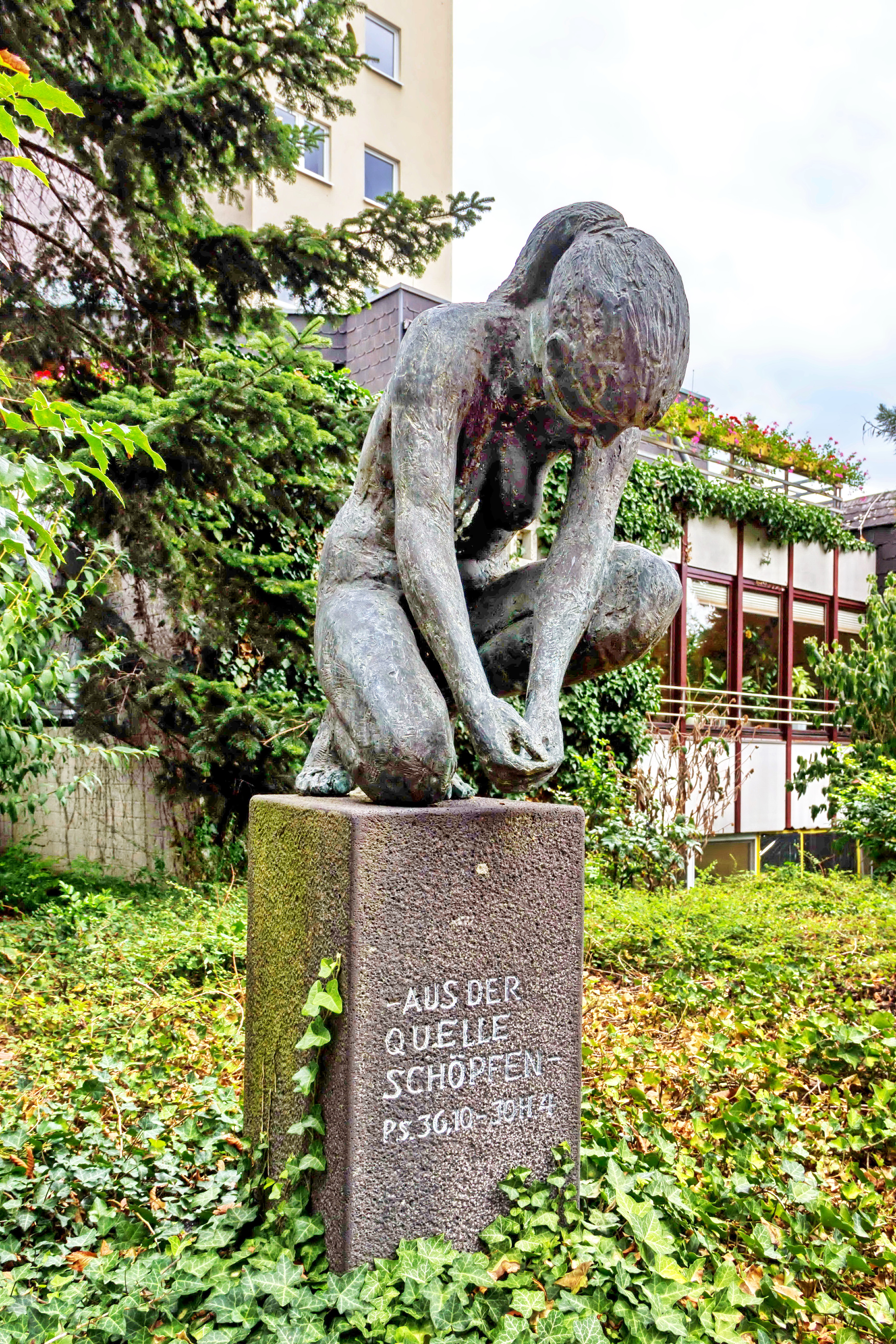 Aus der Quelle schöpfen; Die bronzene Skulptur von Ernemann Sander aus dem Jahr 1993 befindet sich vor dem Eingang des Seniorenzentrums „Theresienau“ in Bonn-Oberkassel. In Anlehnung an Johannes 4, Psalm 36,10 „Denn bei dir ist die lebendige Quelle, und in deinem Licht sehen wir das Licht“ lautet die Inschrift: „- aus der Quelle schöpfen -, Ps 36,10 - Joh 4“